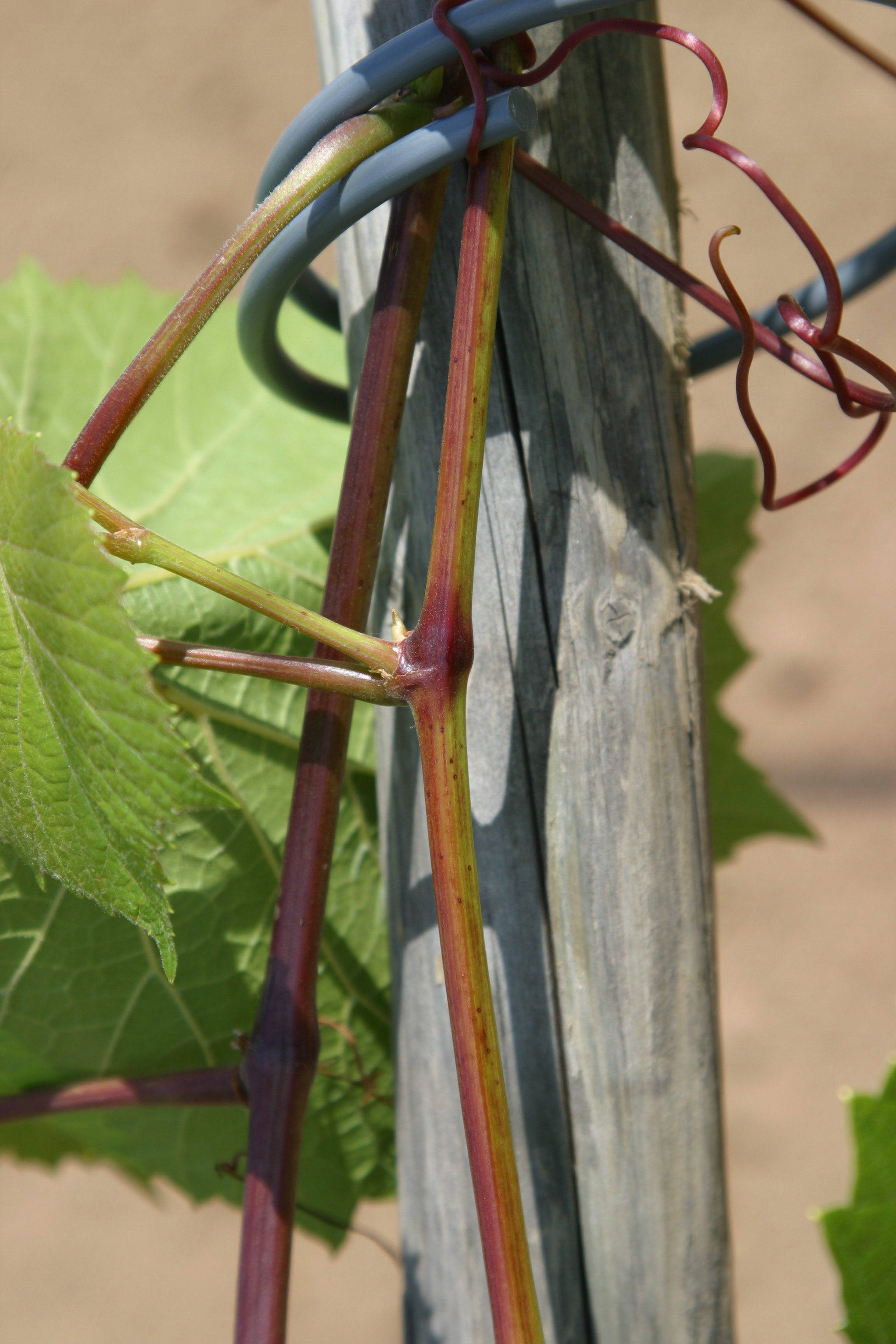 Triebe der Unterlagensorte SO 4